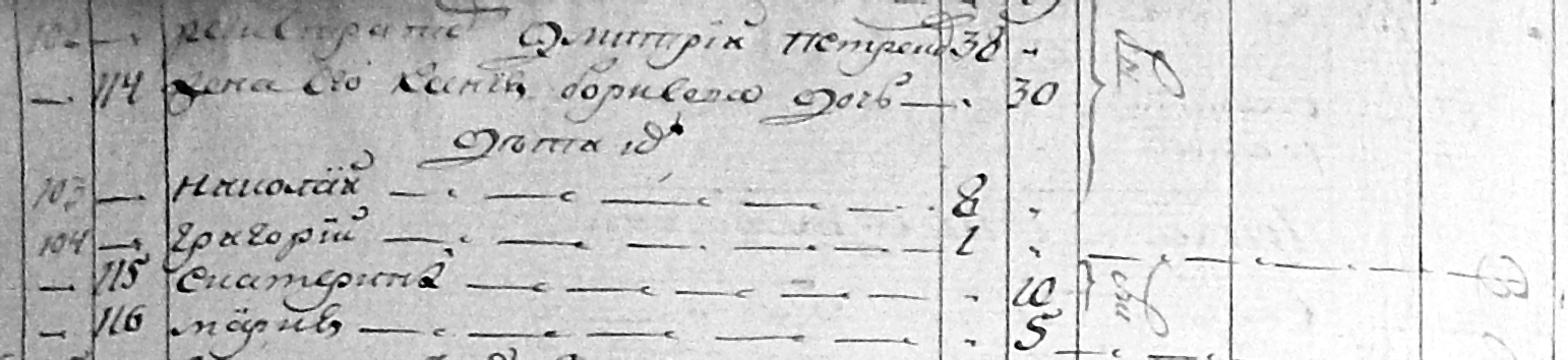 Діда Михайла Петренка діти